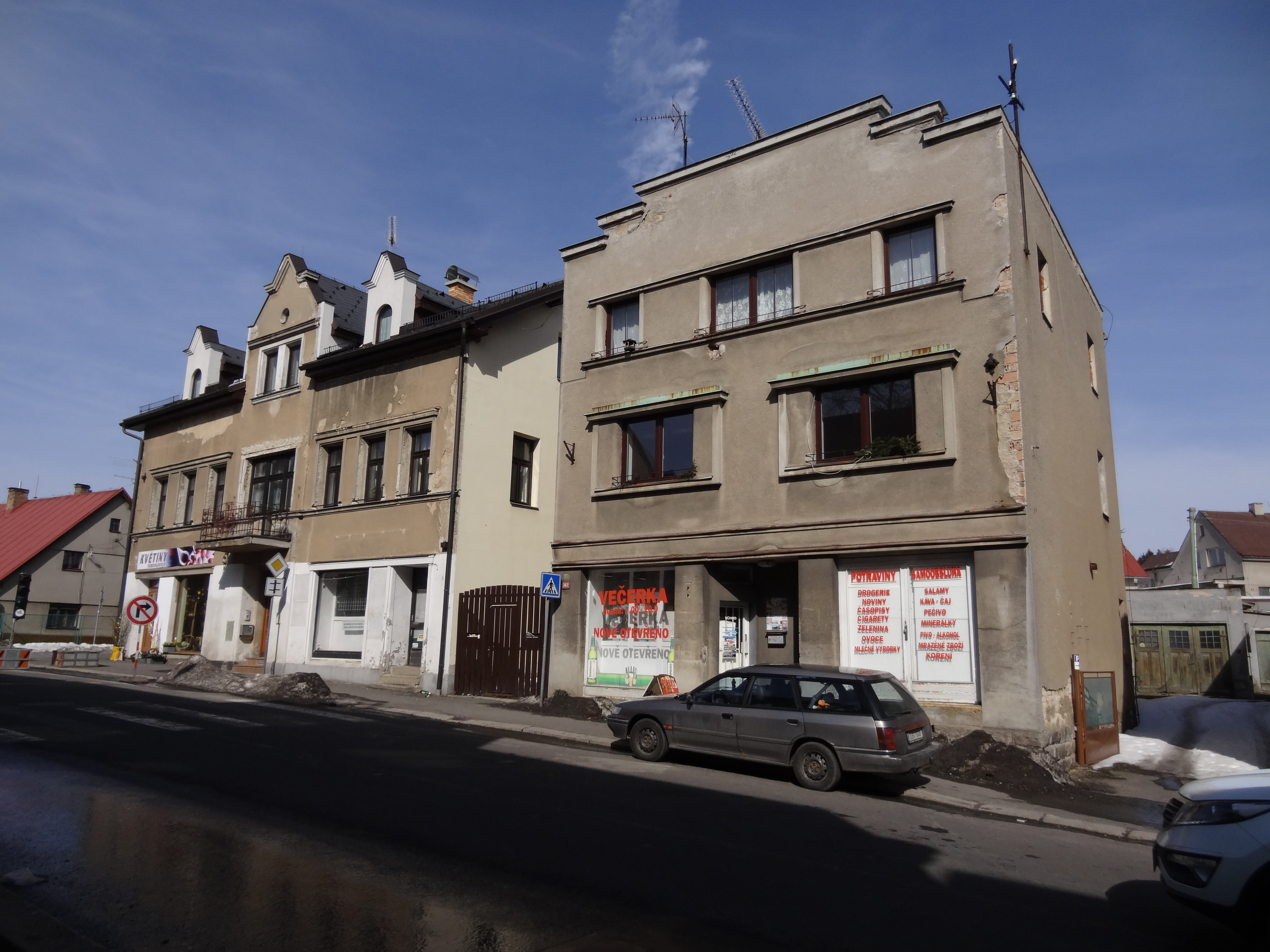 Vrkoslavice - domy čp. 79 a 296 v Pražské ulici